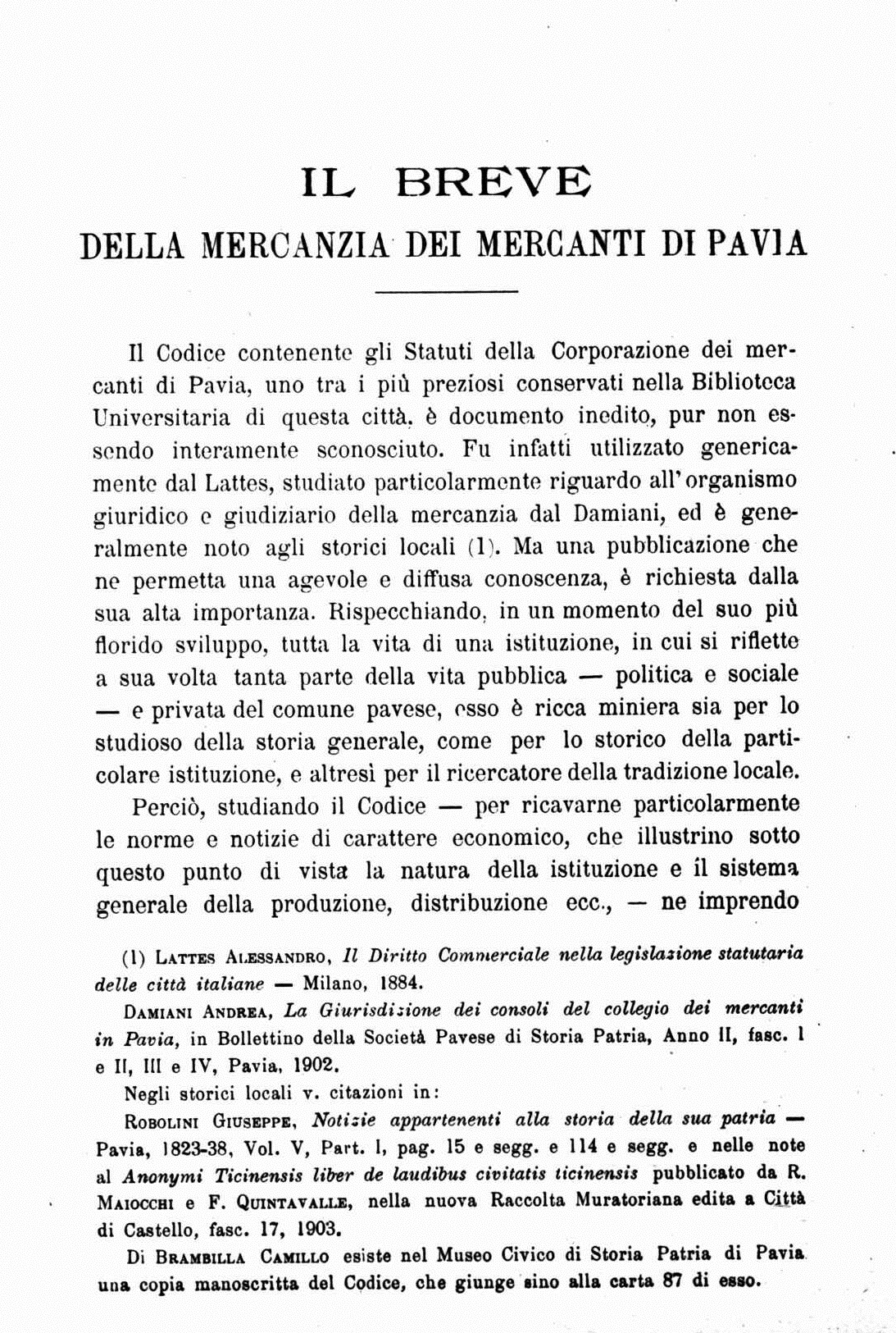 pagina 78